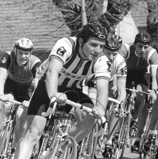 Bert Dietz ADN-ZB Oberst 17.4.88 Bez. Cottbus: Zum Frühjahrsrennen der Straßenradsportler Rund um Görlsdorf gingen 103 Fahrer auf die 145 km lange Strecke, die in zehn Runden absolviert wurde. Bereits unmittelbar nach dem Start zerriß das Feld, hier Bert Dietz (Nr. 2), DHfK Leipzig. Abgebildete Personen: Dietz, Bert: Radsportler, SC Deutsche Hochschule für Körperkultur und Sport (DHfK) Leipzig, Friedensfahrt 1990, DDR